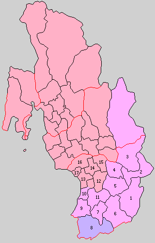 滋賀県坂田郡の町村制時点の町村。